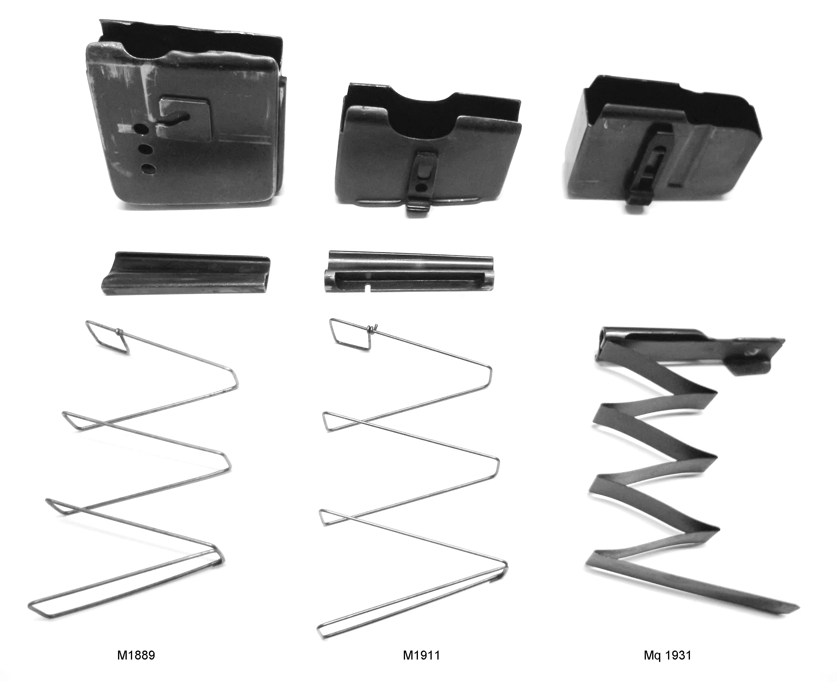 Magasin démonté du M 1889, M 1911, Mq 1931